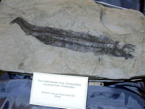 Pesce ingordo